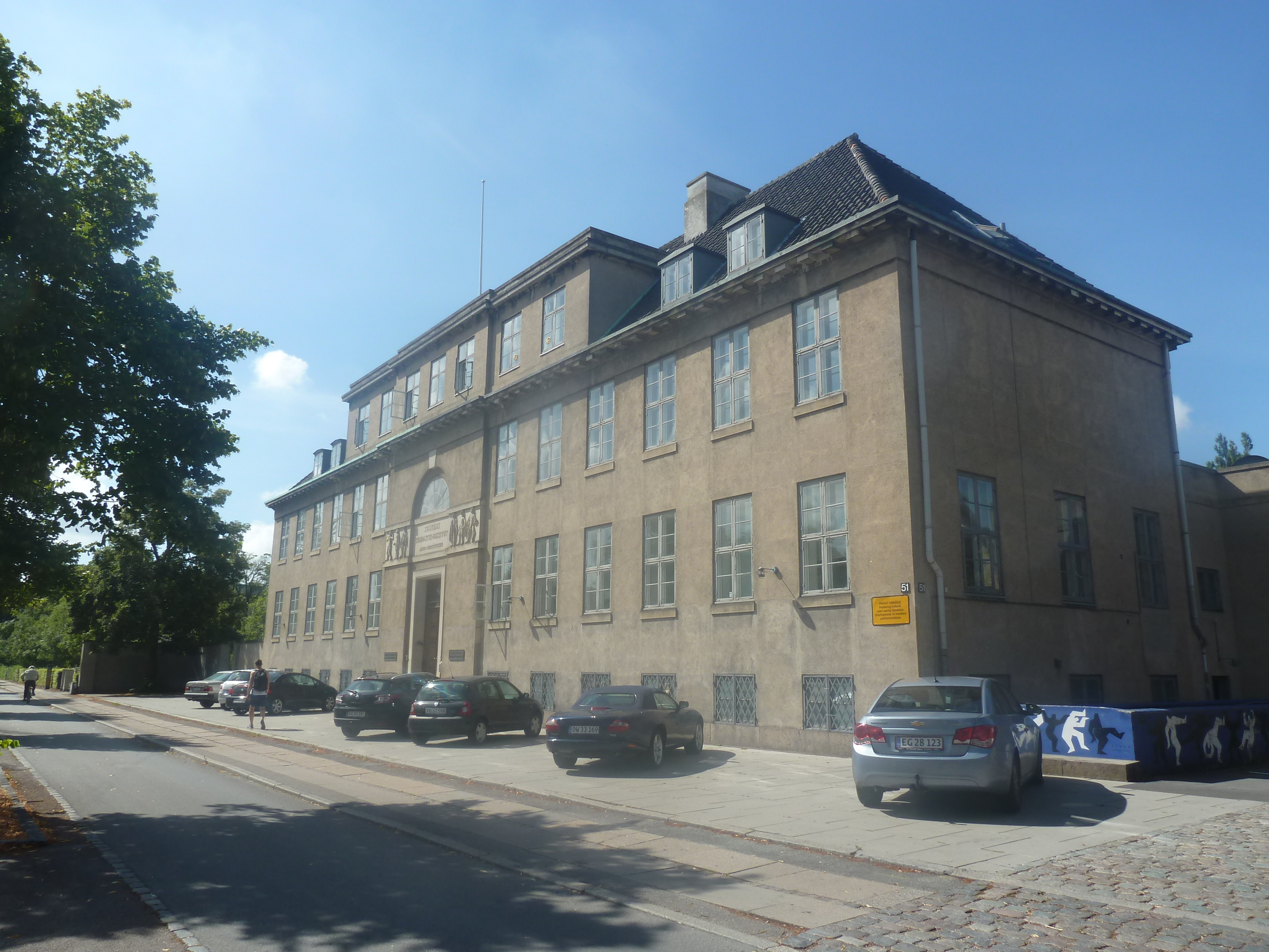 Institut for Idræt in Østerbro, Copenhagen.